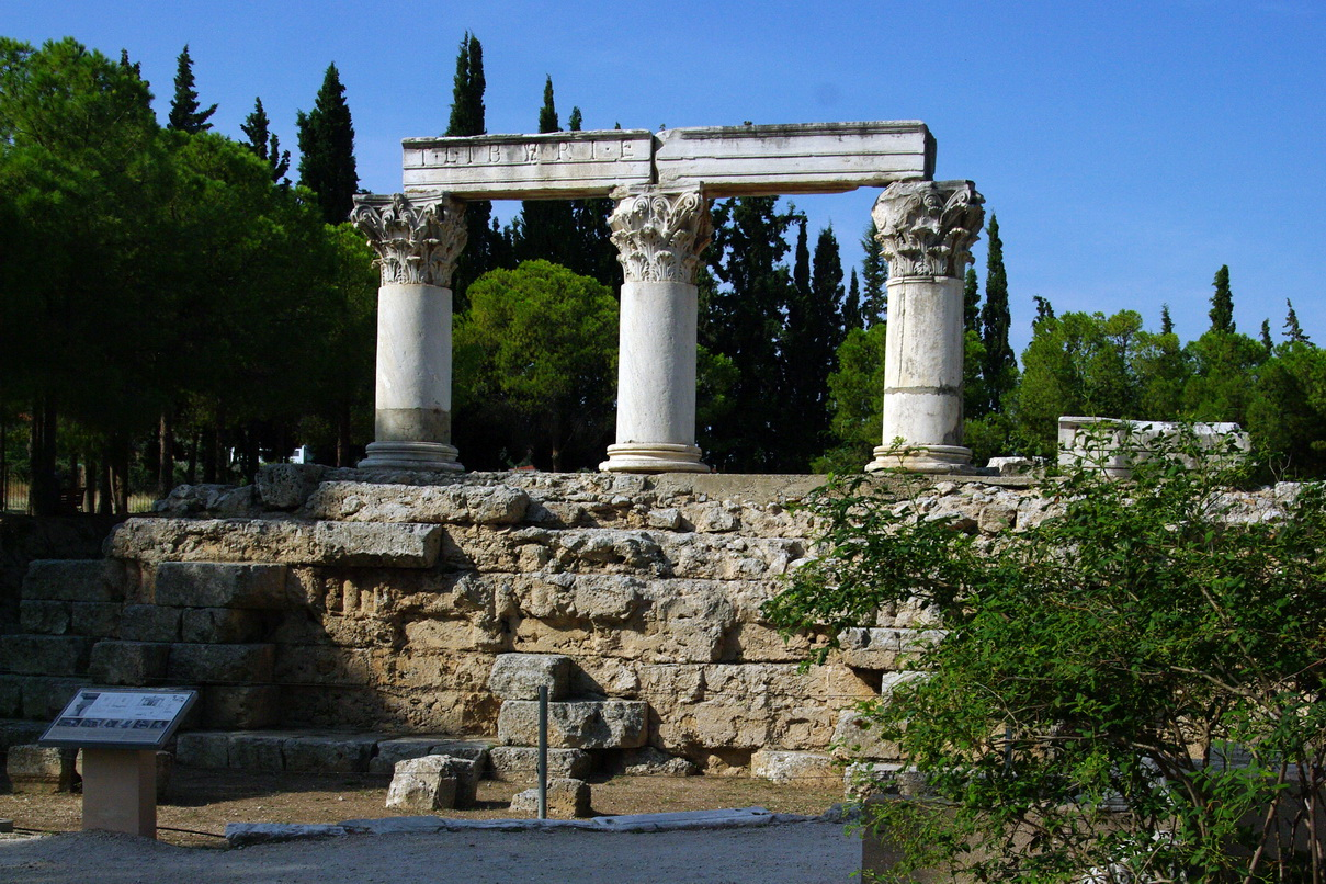 Octavia-Tempel, Korinth